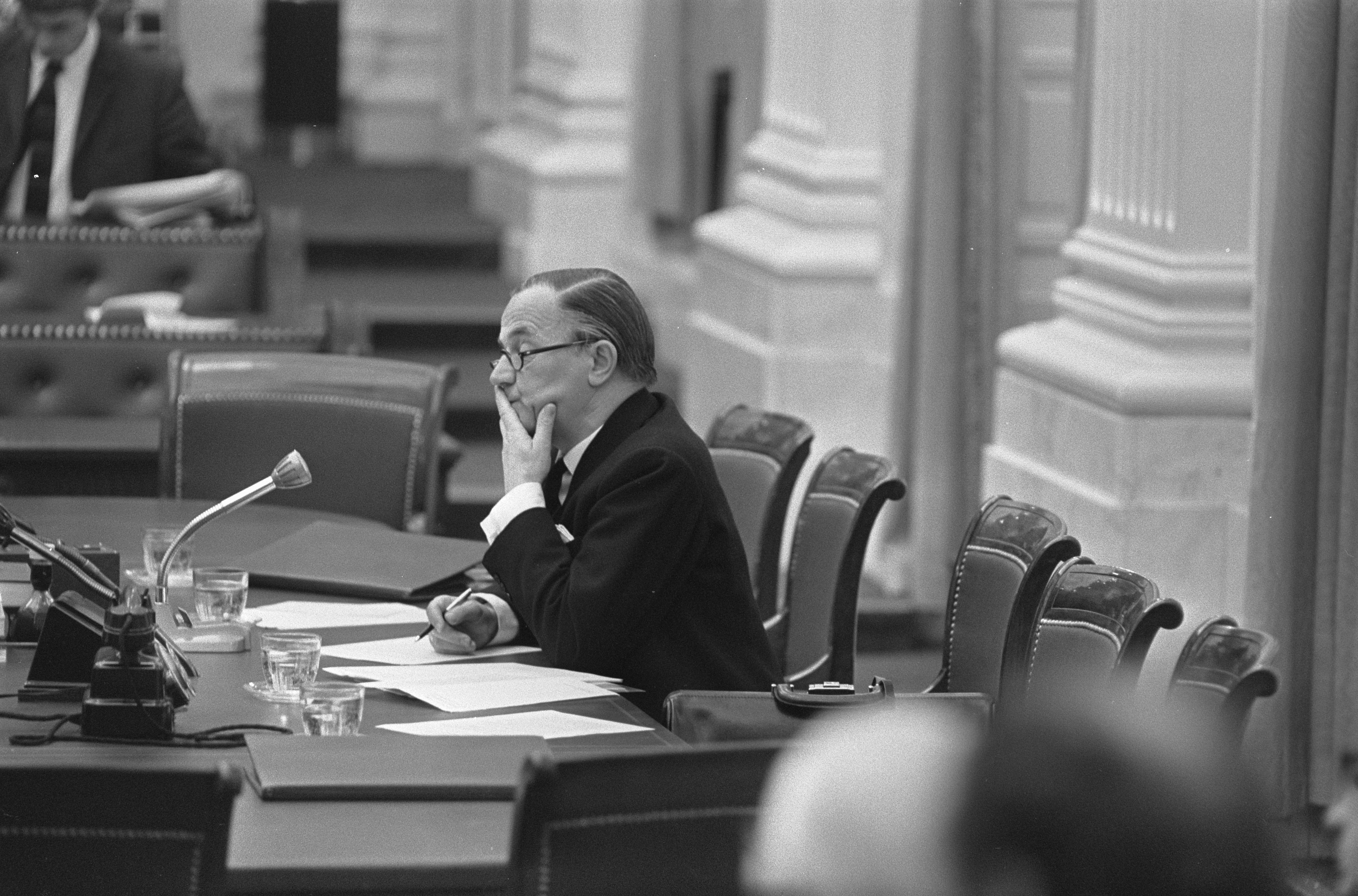 Jong, P.J.S. de (KVP). Minister president De Jong achter de regeringstafel tijdens Tweede Kamer-debatten over mogelijke excessen bij militaire acties in Indonesië in de jaren 1945-1948. Nederland, Den Haag, 25 maart 1969.